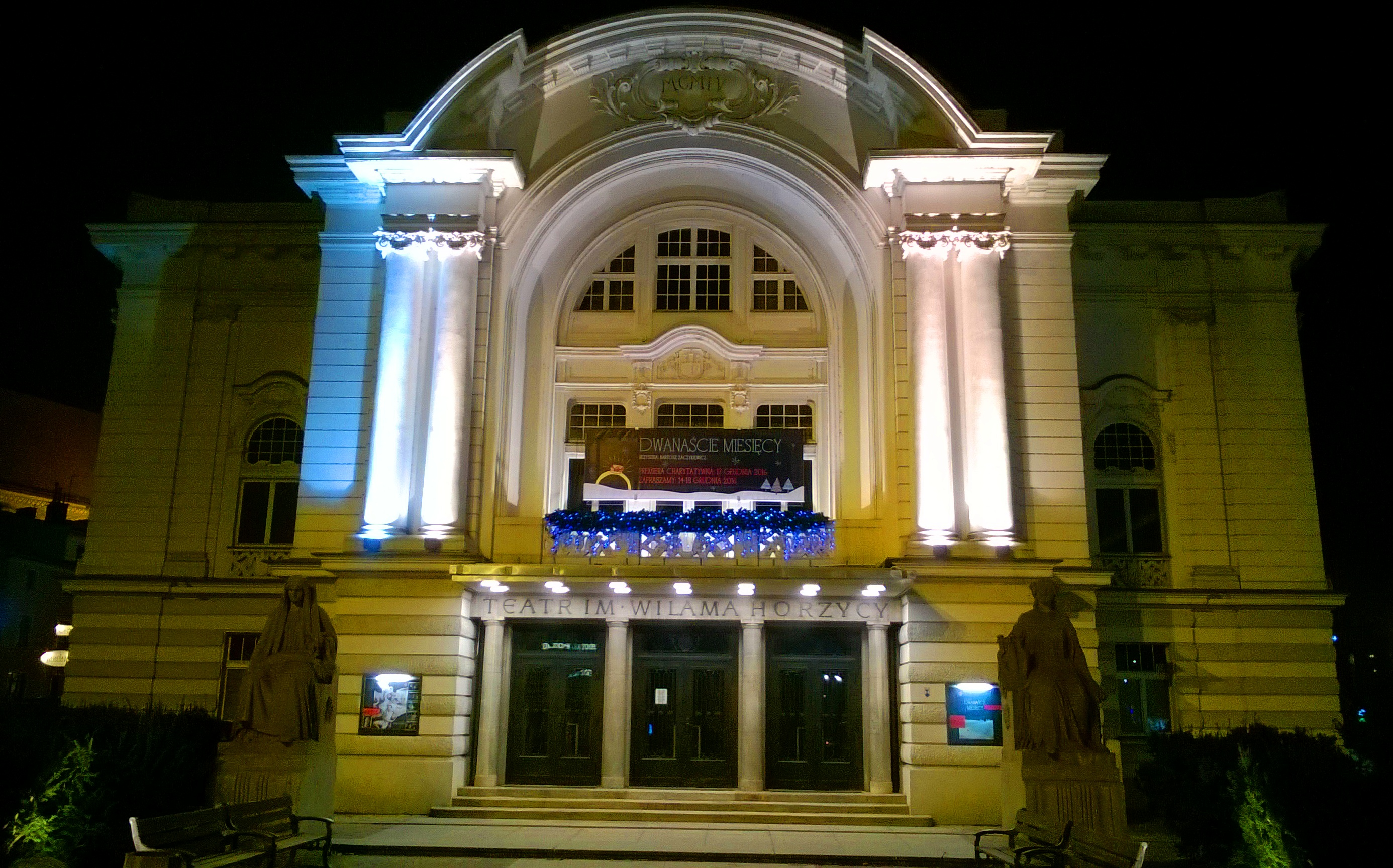 Teatr im. Wilama Horzycy w świątecznej szacie, Toruń